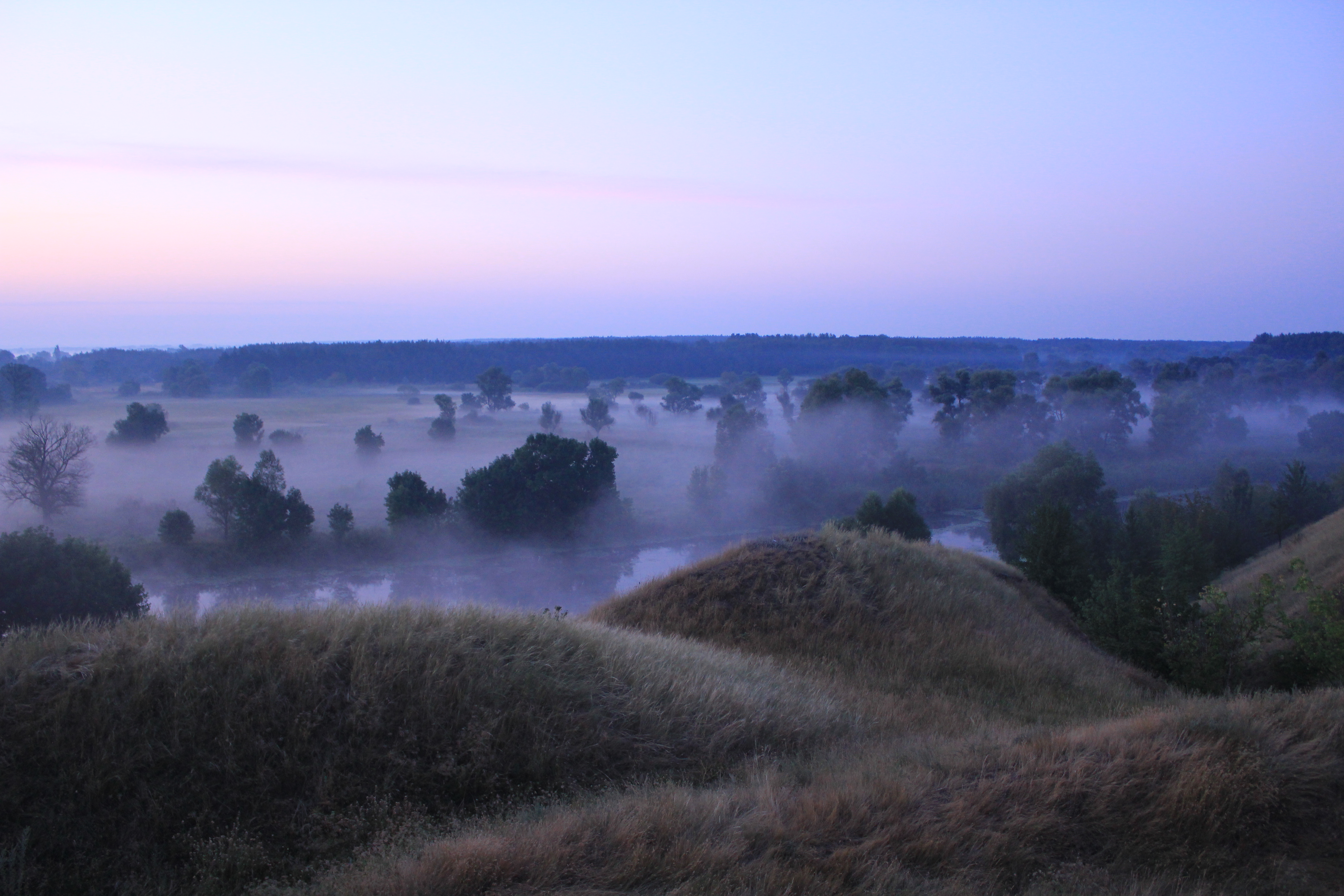 Нижньосульський, Оржицький р-н: околиці сіл Великоселецьке, Малоселецьке, Плехів, Онішки, Чутівка. Сулинська затока Кременчуцького водосховища, Глобинський р-н: в околицях с. Липове. Семенівський р-н: в околицях сіл Горошине, Погребняки, Дем'янівка